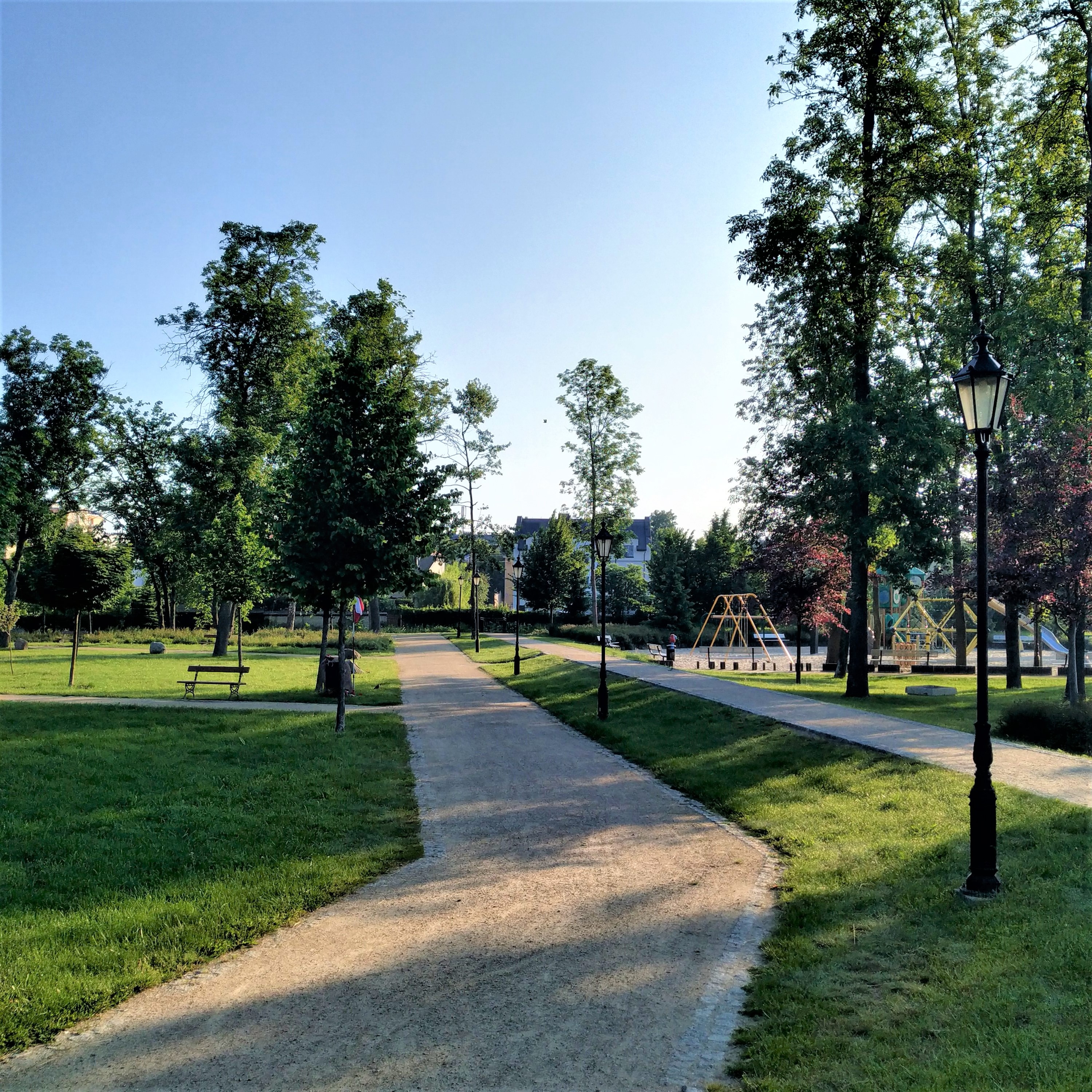 Park Miejski w Łukowie